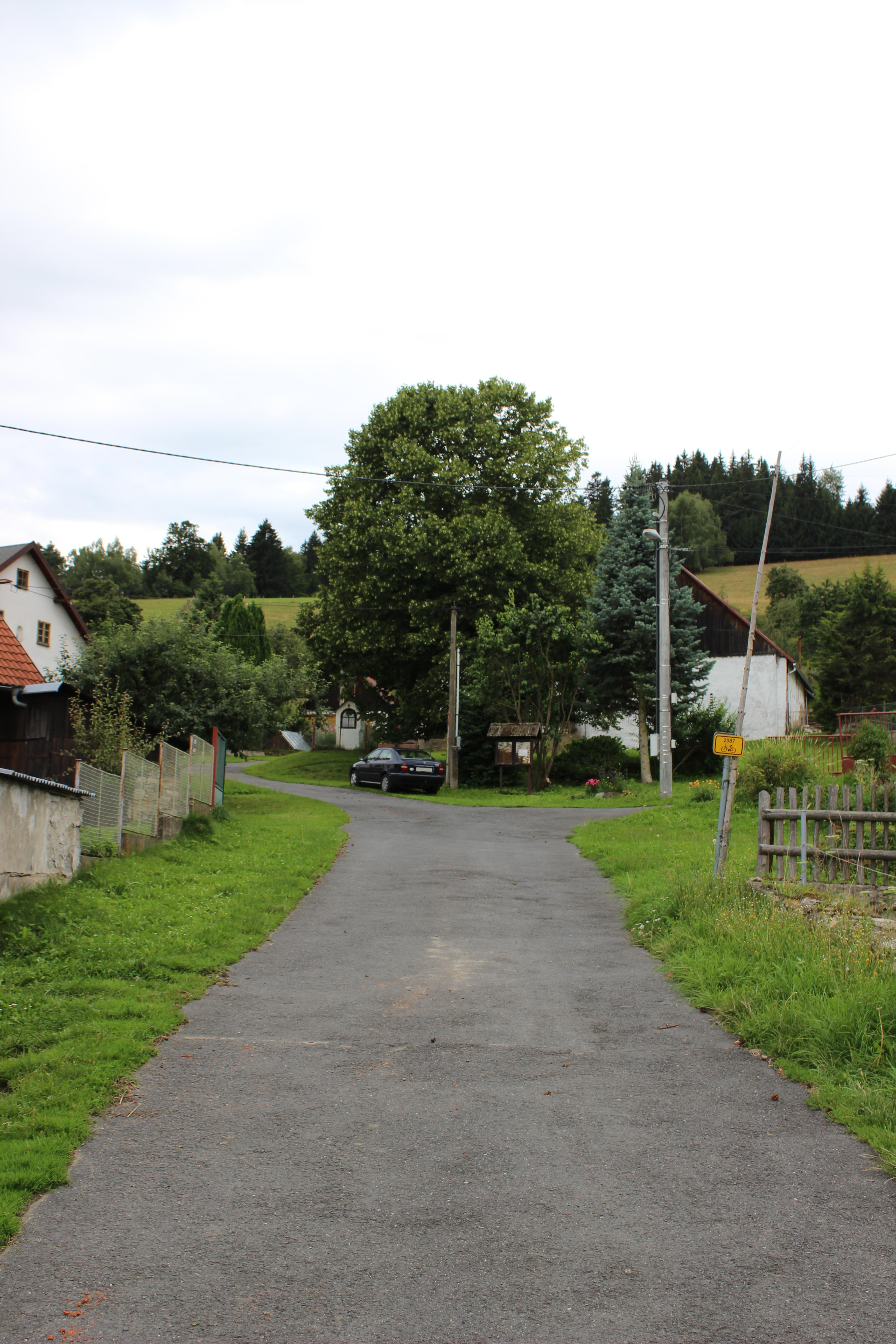 Náves v Javoří, části Hartmanic v klatovském okrese (pohled od severovýchodu).